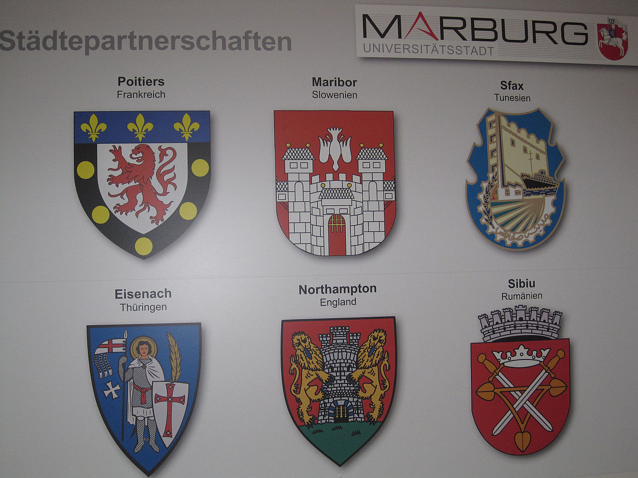 Stadtwappen der Marburger Partnerstädte im Stadtverordnetensitzungsaal